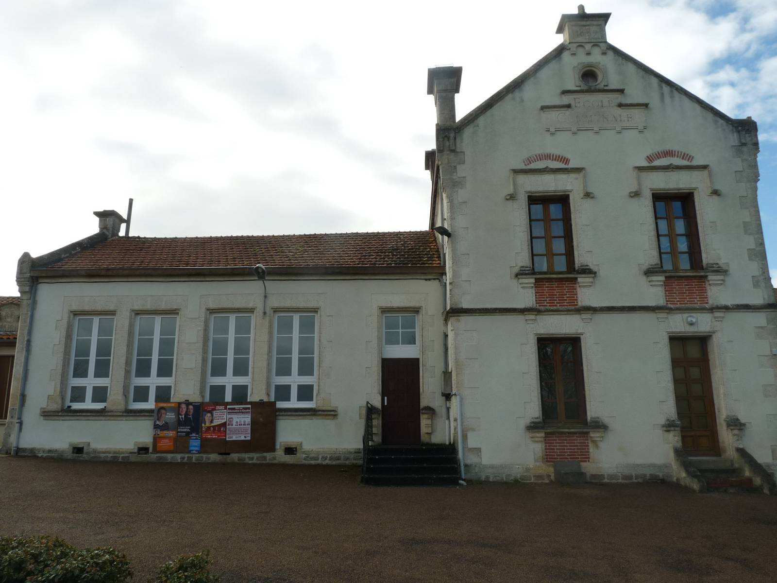 mairie de Mazières, Charente, France